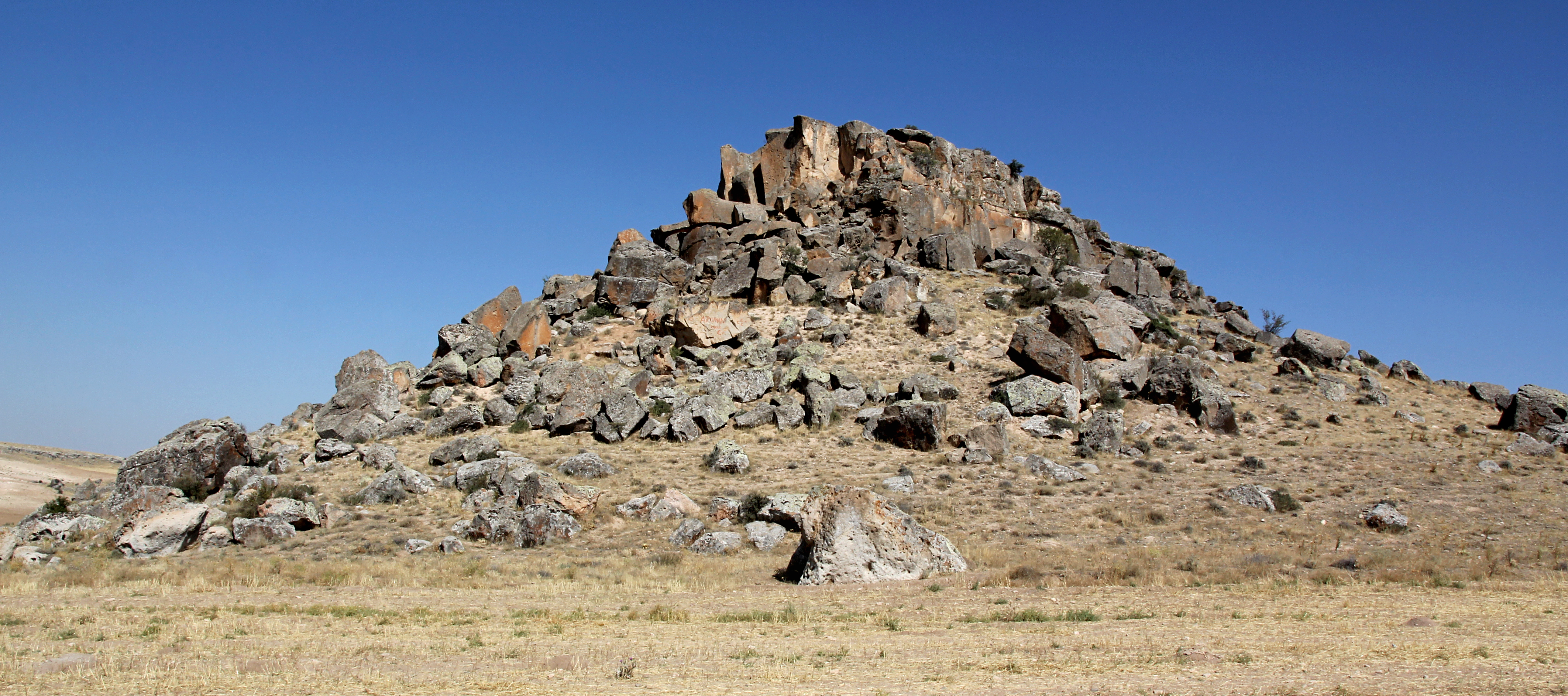 späthethitische Felsinschrift von Burunkaya bei Aksaray, Zentraltürkei